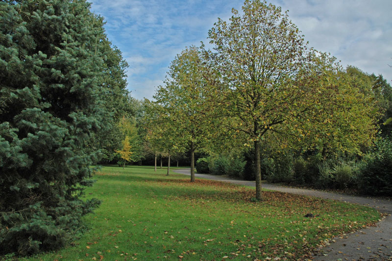 Germany Bergkamen Hauptfriedhof